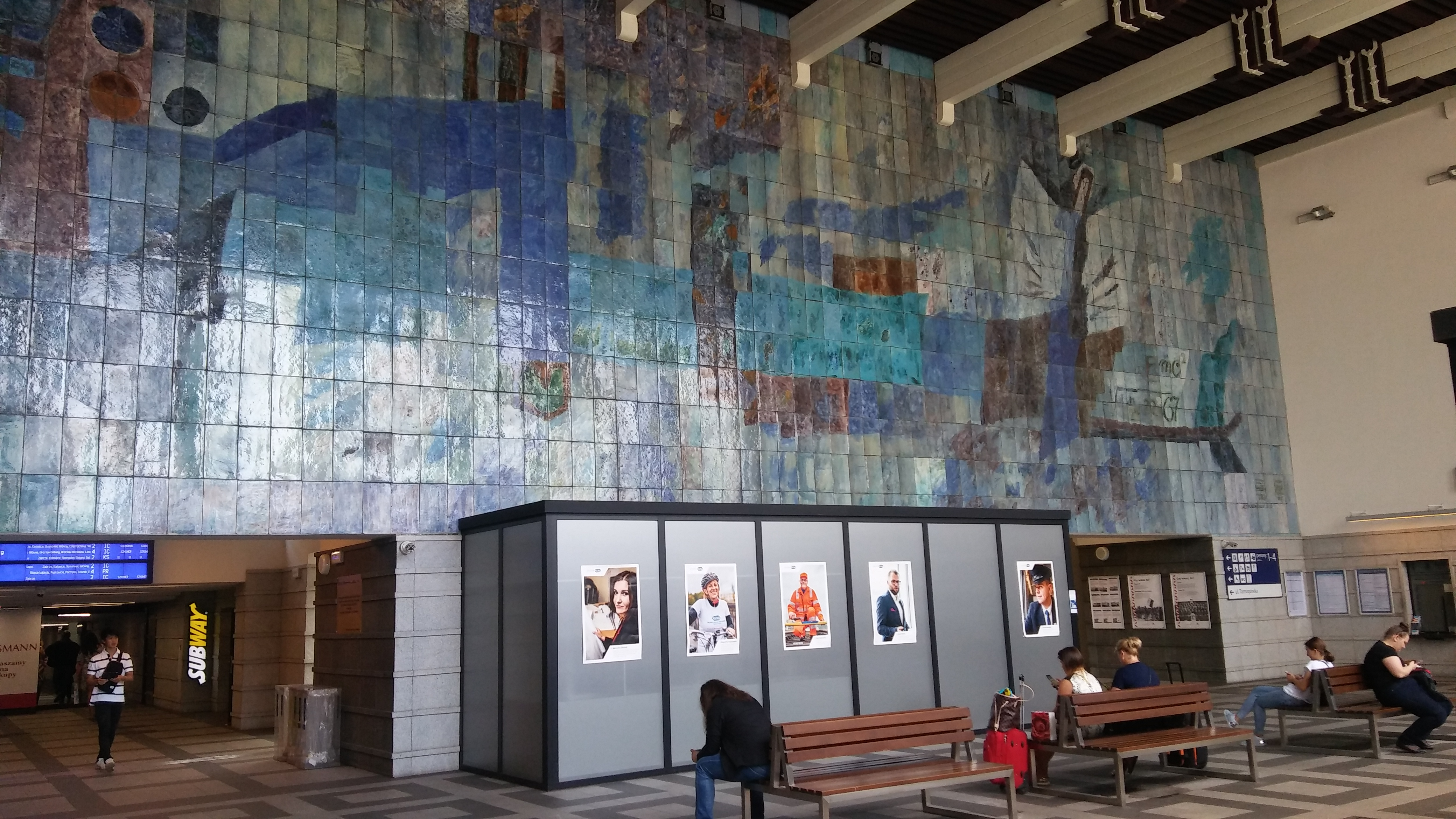 Poczekalnia dworca kolejowego w Gliwicach.